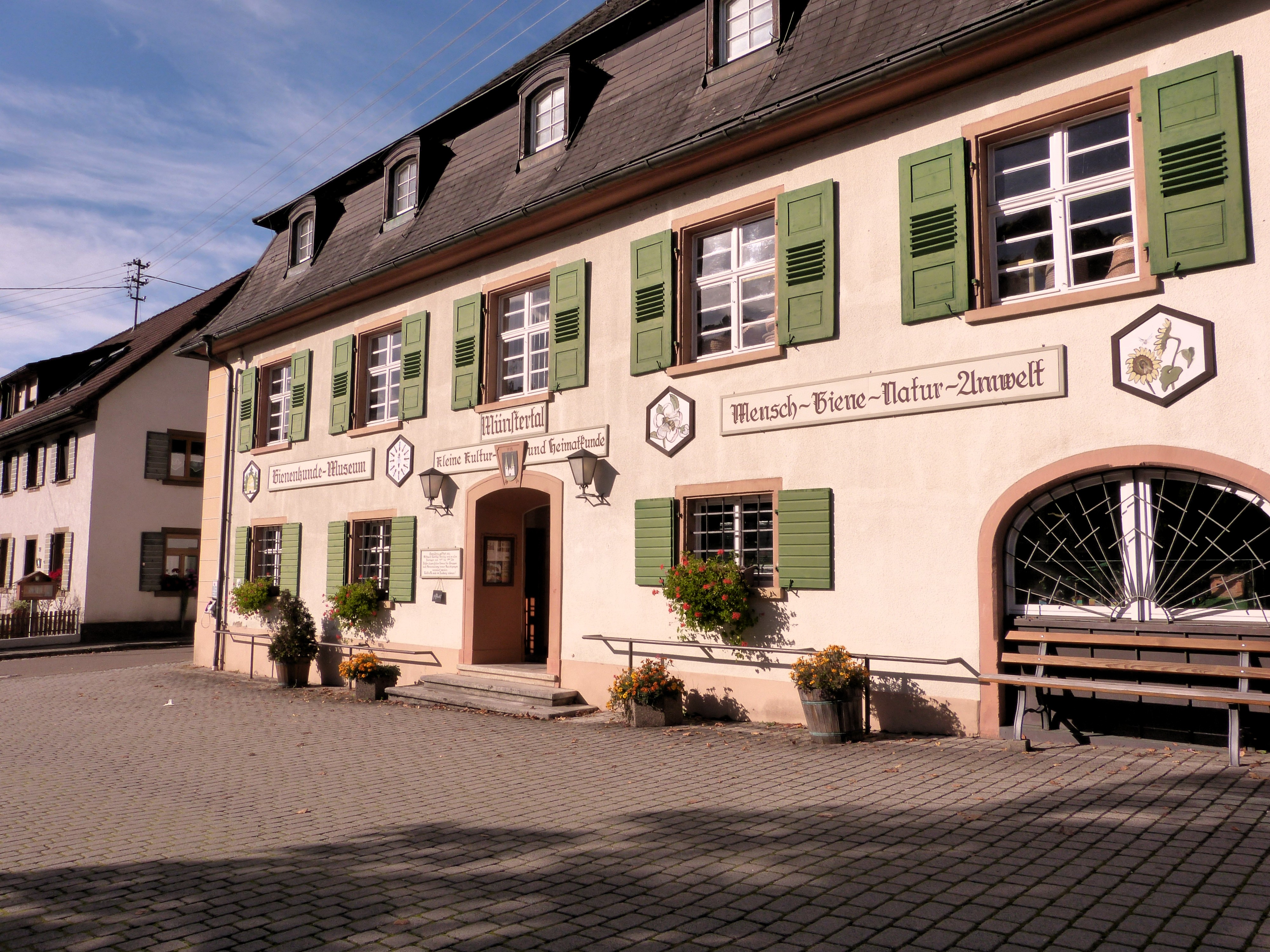 Das Bienenkundemuseum in Münstertal/Schwarzwald zeigt die Geschichte und die Gegenwart der Imkerei.